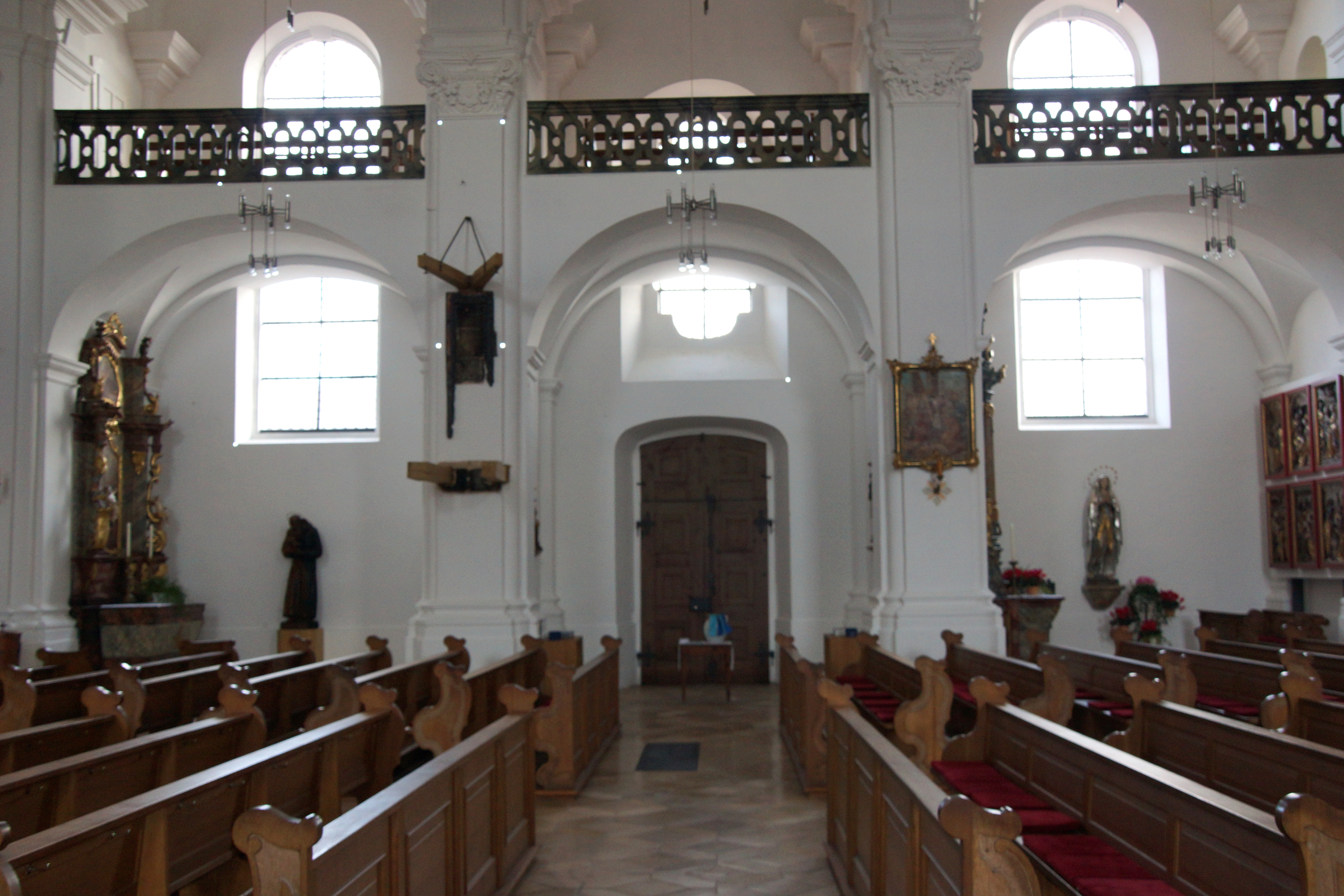 Die katholische Pfarrkirche St. Ägidius in Vilseck in der Oberpfalz